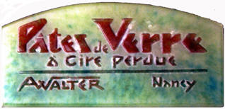 Amalric WALTER, Plaque publicitaire en pâte de verre, ca.1920, 15 x 8 cm